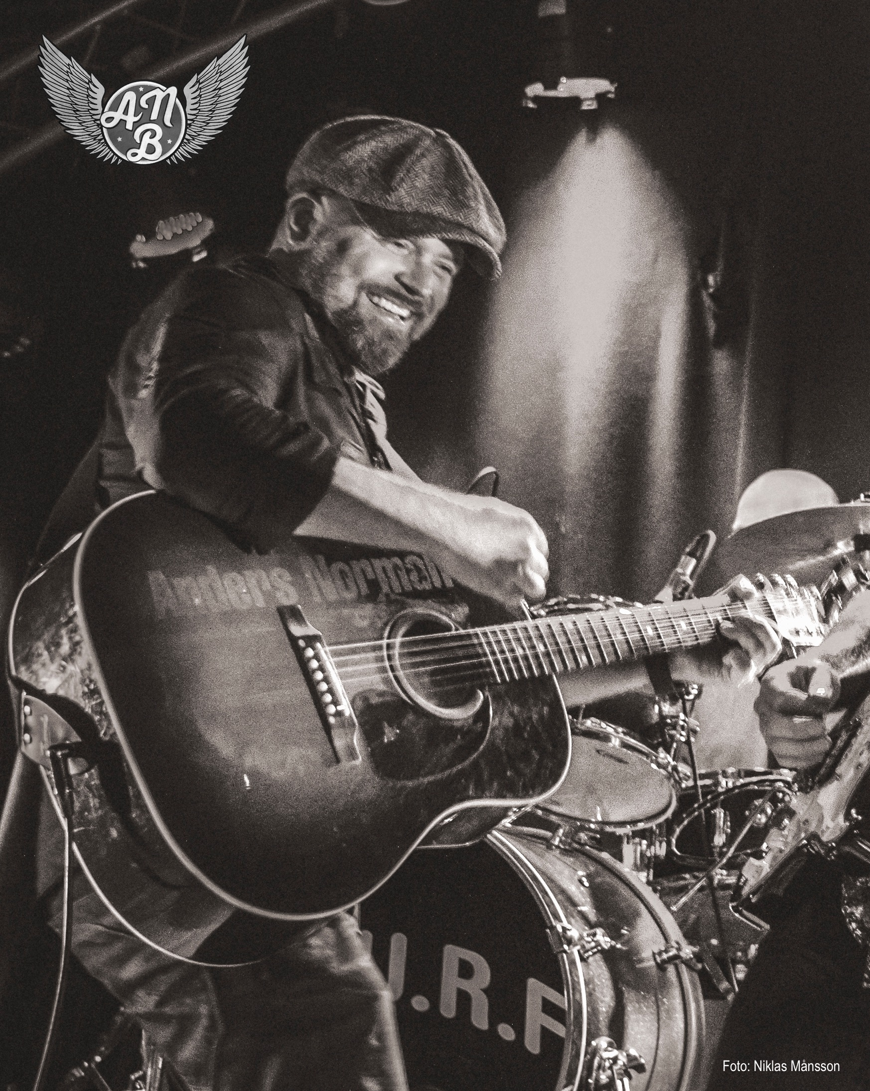 Fotograf: Niklas Månsson